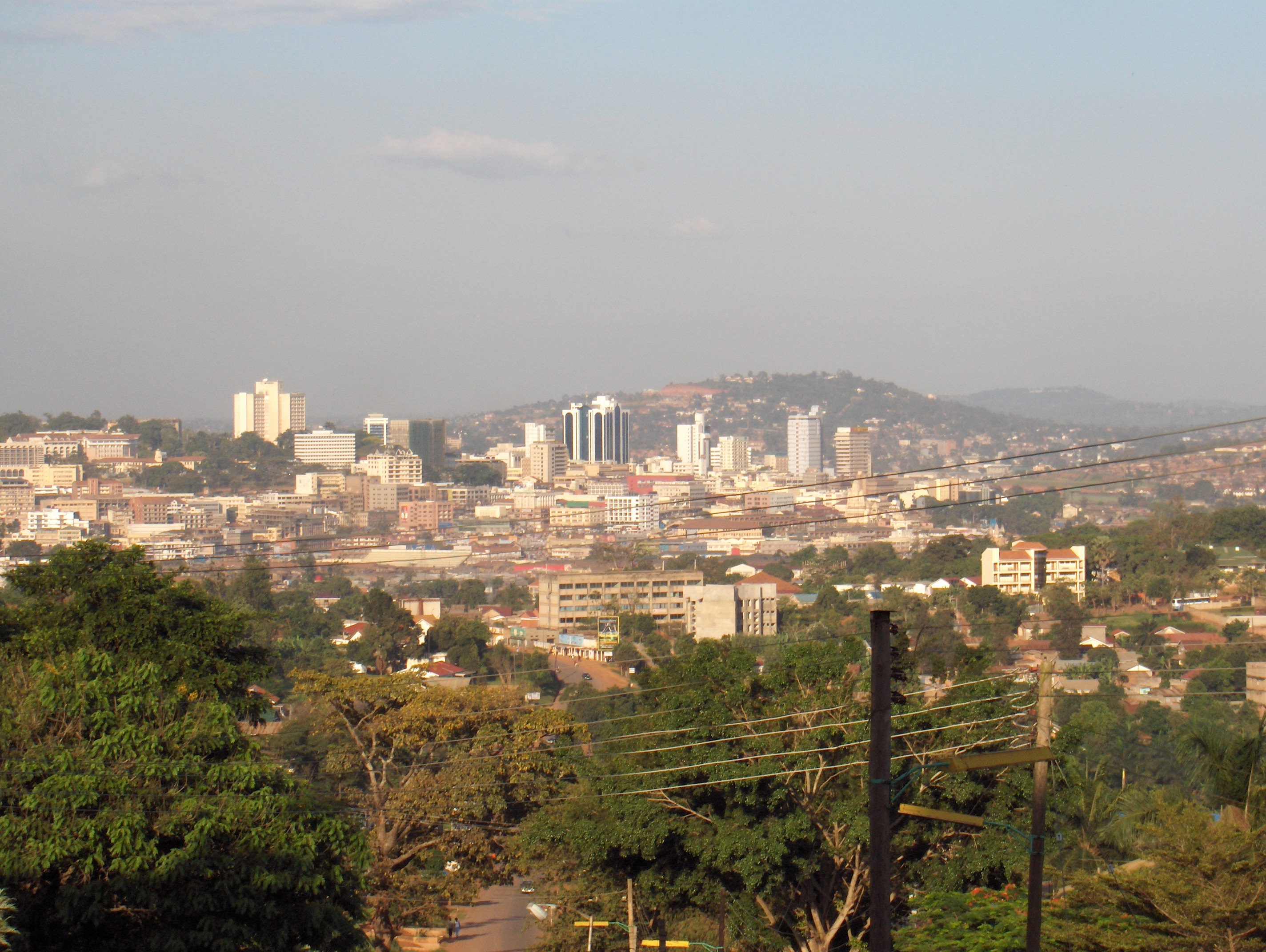 Eigen foto, gemaakt op 15-10-2006 in Kampala. De foto is gemaakt vanaf 1 van de 7 heuvels waarop Kampala gebouwd is (volgens mij Namirembe Hill)